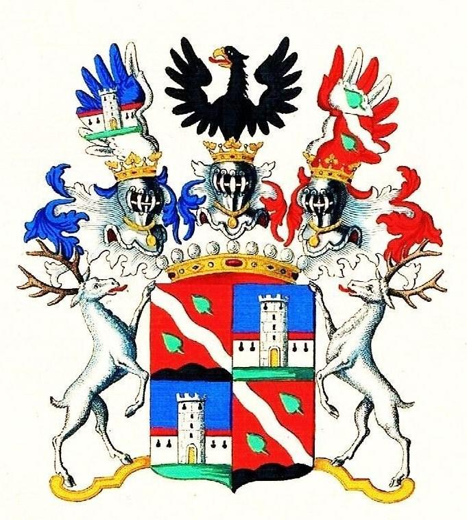 Wappen Berchem - Tyroff AT.jpg